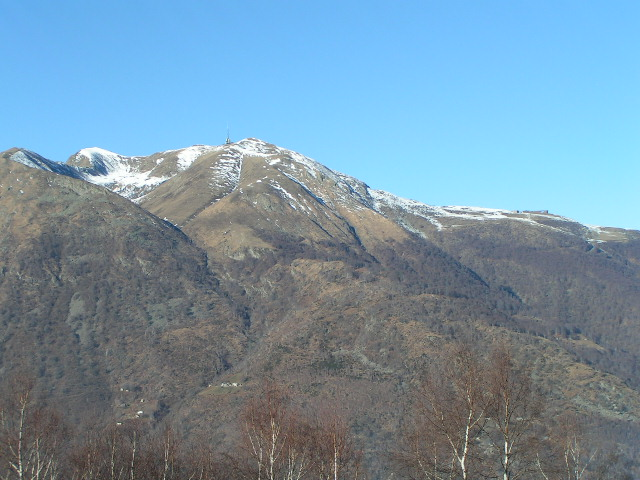 Monte Tamaro Canton Ticino Foto scattata dall'utente Elvezio